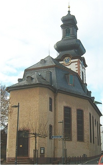 Bornheimer (FFM) Johanniskirche in Bornheim, Germany, fotografiert vom Lokal Schmärrnche aus.